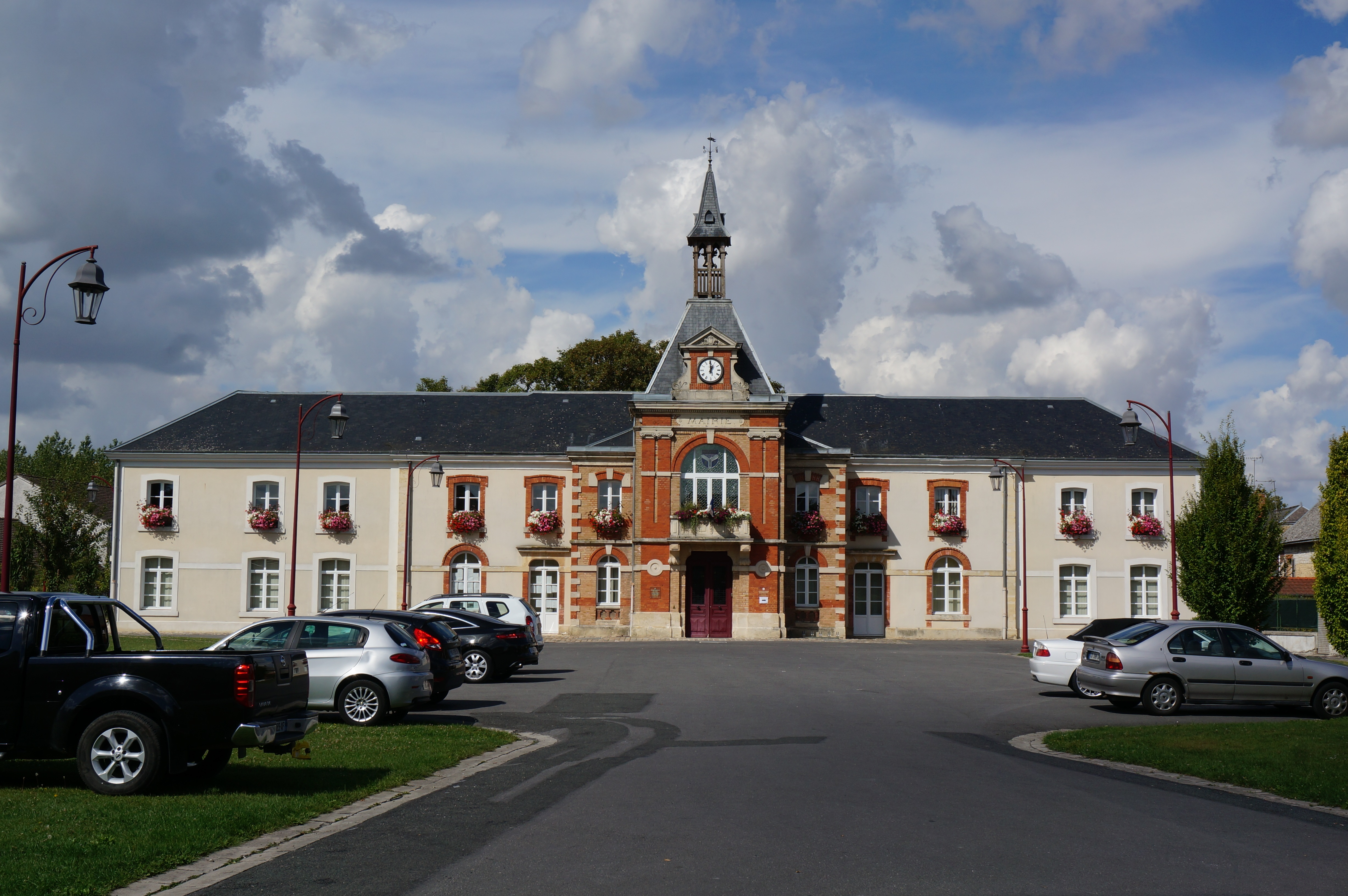 La Mairie de Bazancourt .